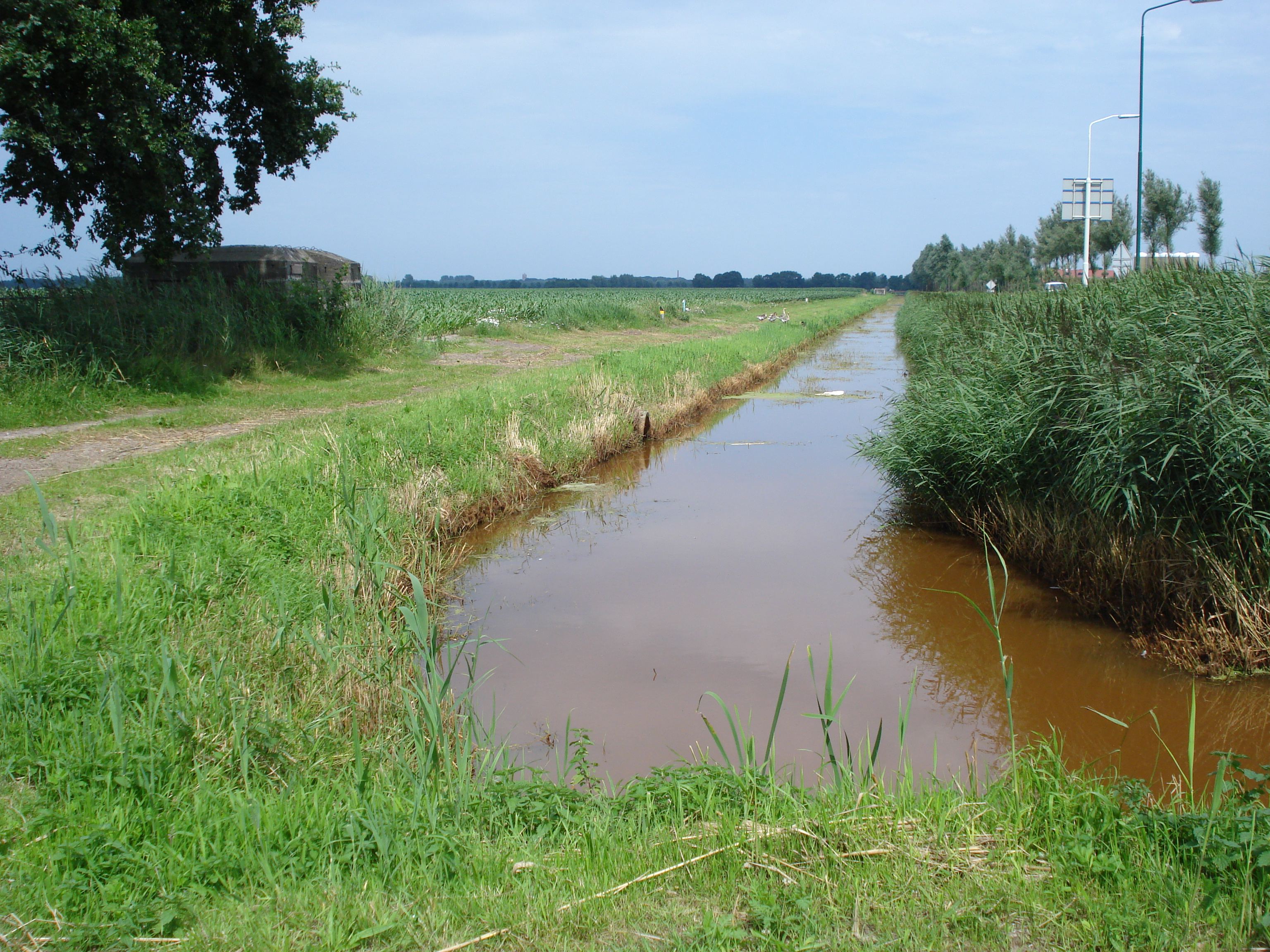 Volkel, commune d'Uden, wetering (bief de drainage) dans le Peel. À gauche casemate de la ligne Peel-Raam.